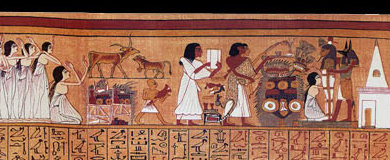 Papyrus d'Ani